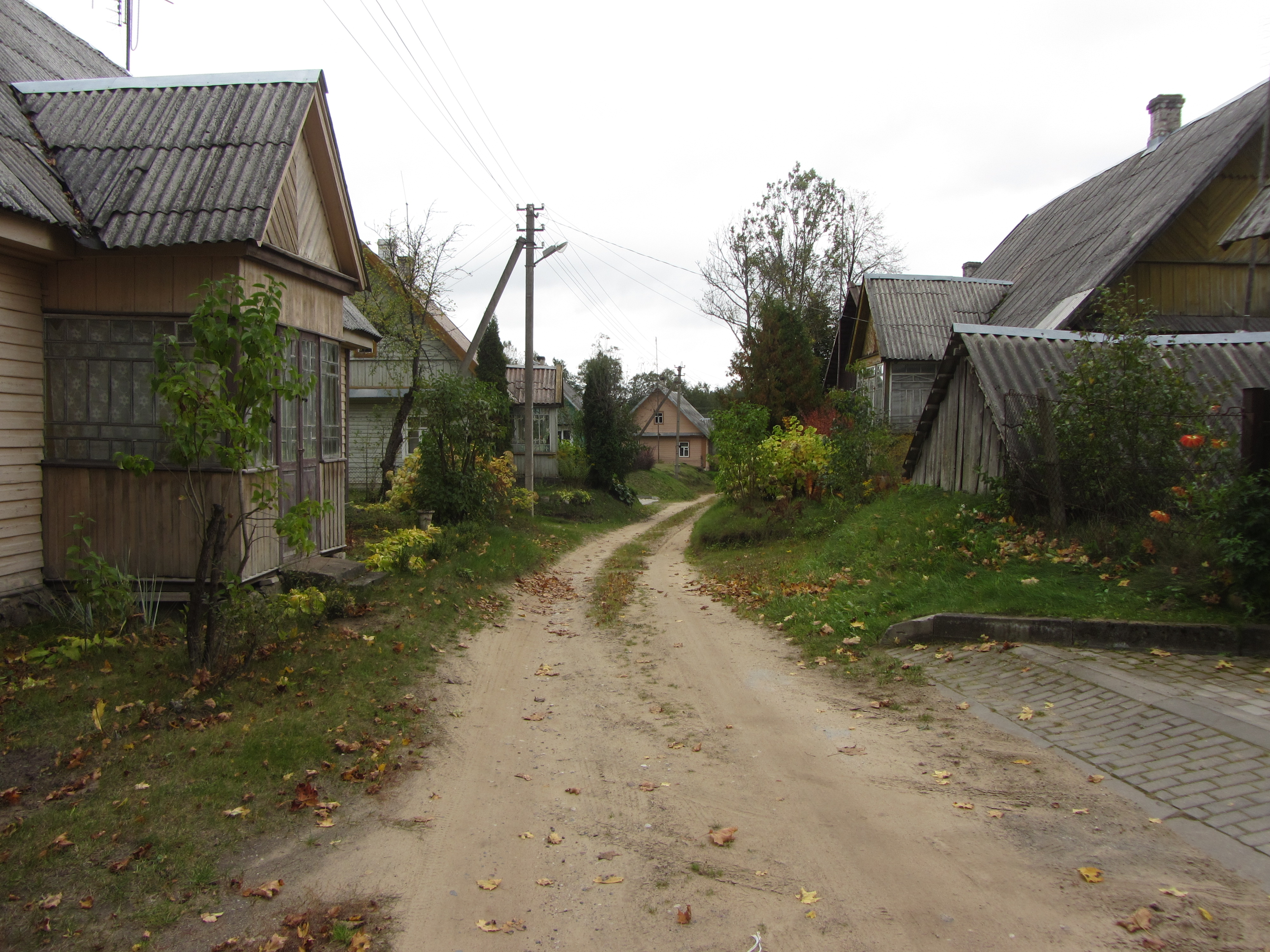 Kaltanėnai, Lithuania